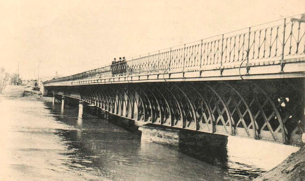 Фотография Железного моста на реке Омь в Омске.